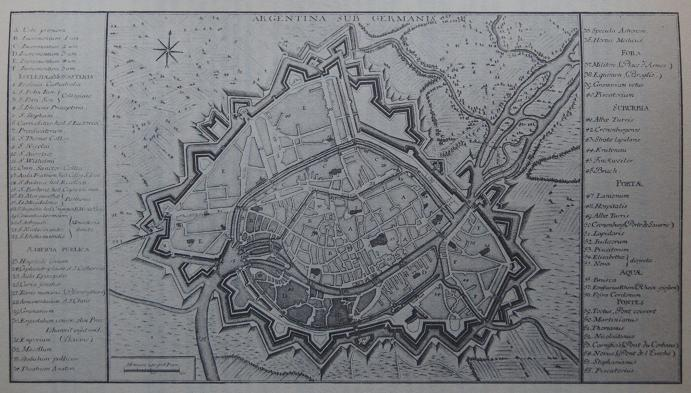 Photographie d'un plan de Strasbourg vers 1681